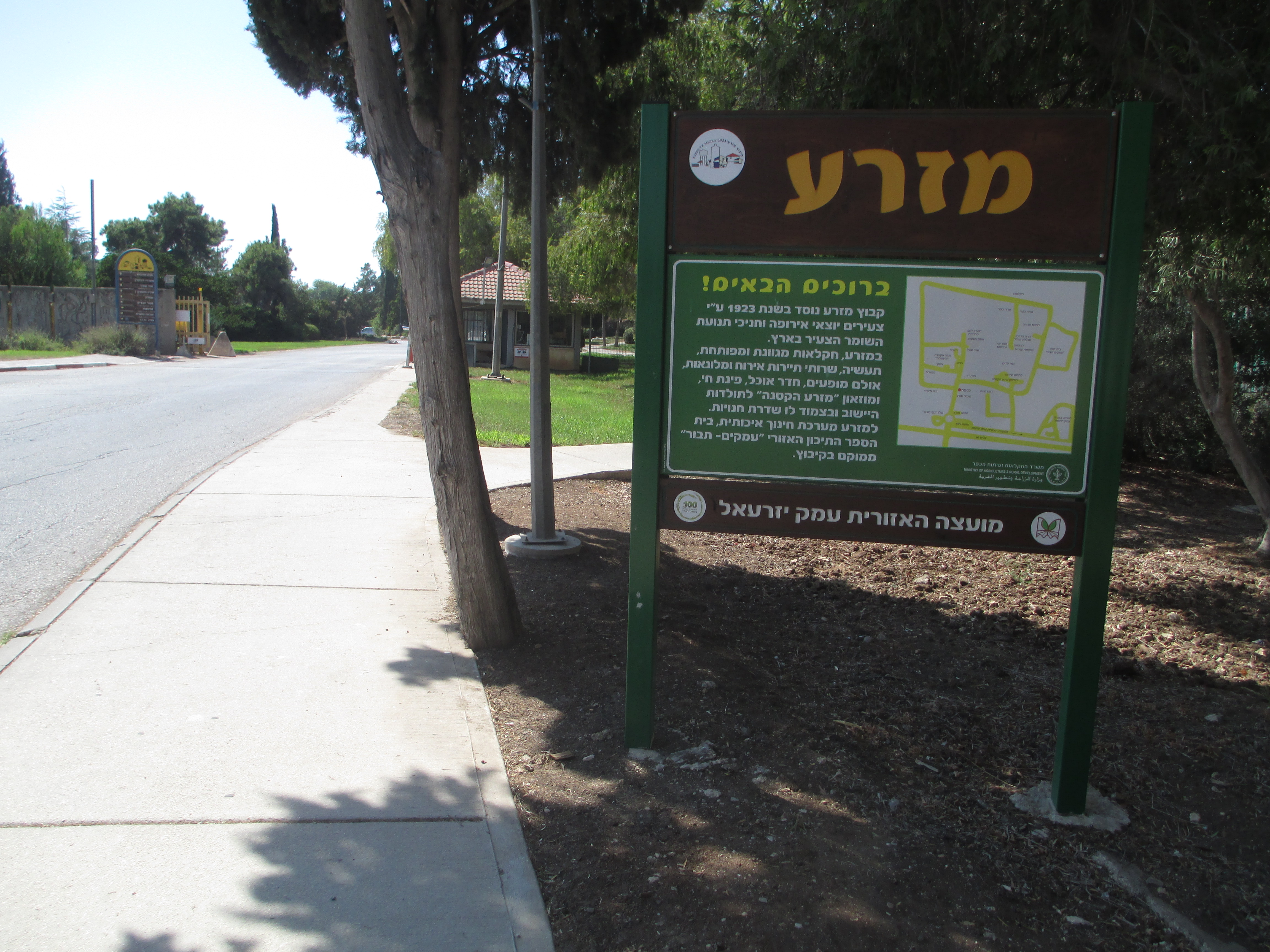 הכניסה לקיבוץ מזרע